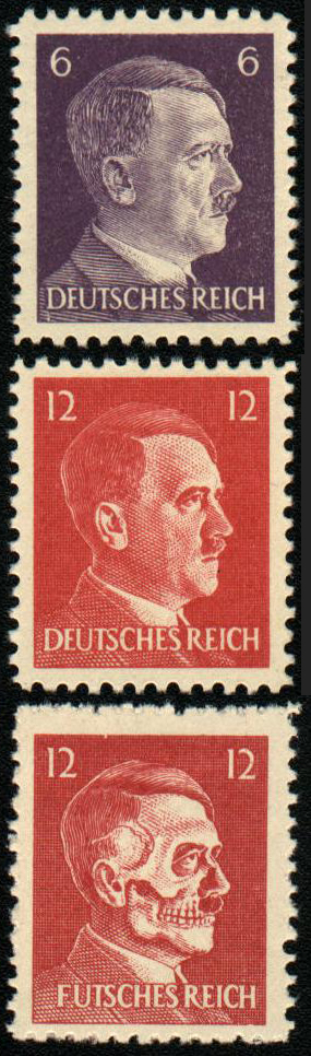 Von der OSS gefälschte deutsche Briefmarken.